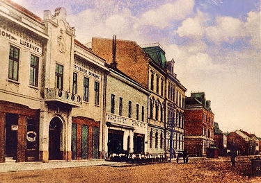 Grand Hotel, Glavna ulica, Šabac